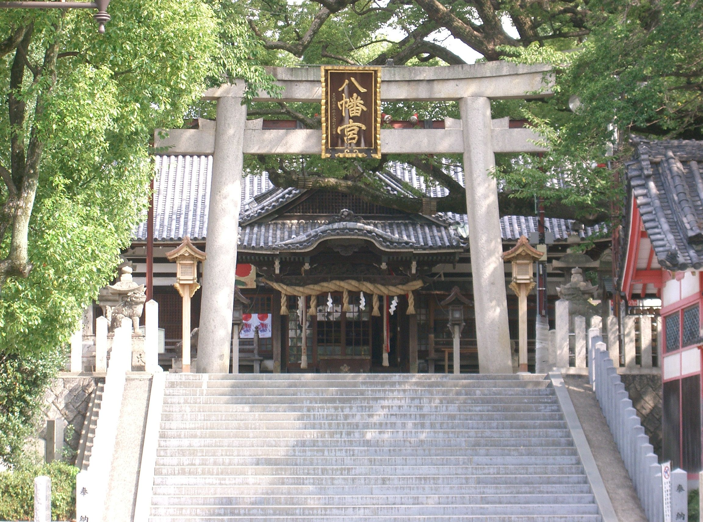 百舌鳥八幡宮